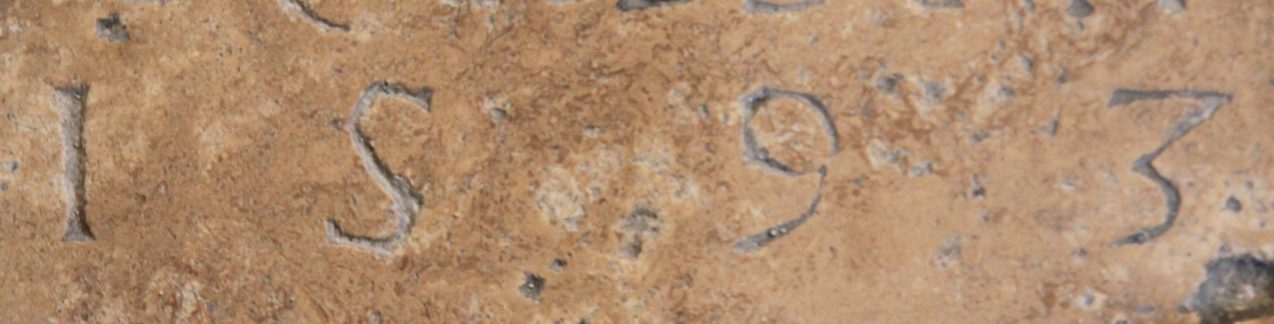 Fragment d'una làpida del monestir de Sant Pere de Besalú amb la inscripció de l'any 1593